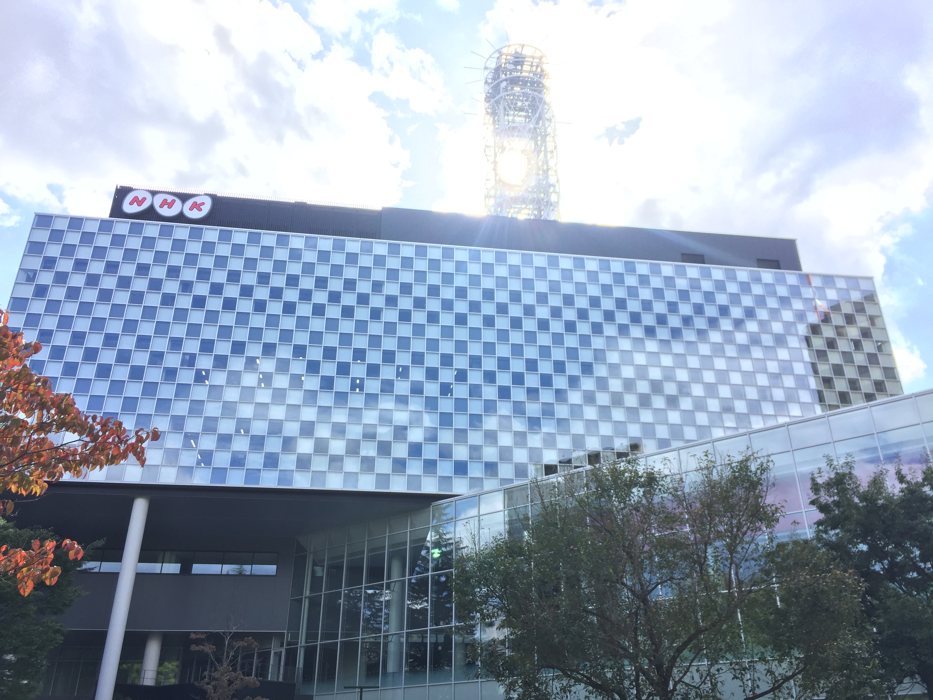 NHK仙台新放送会館